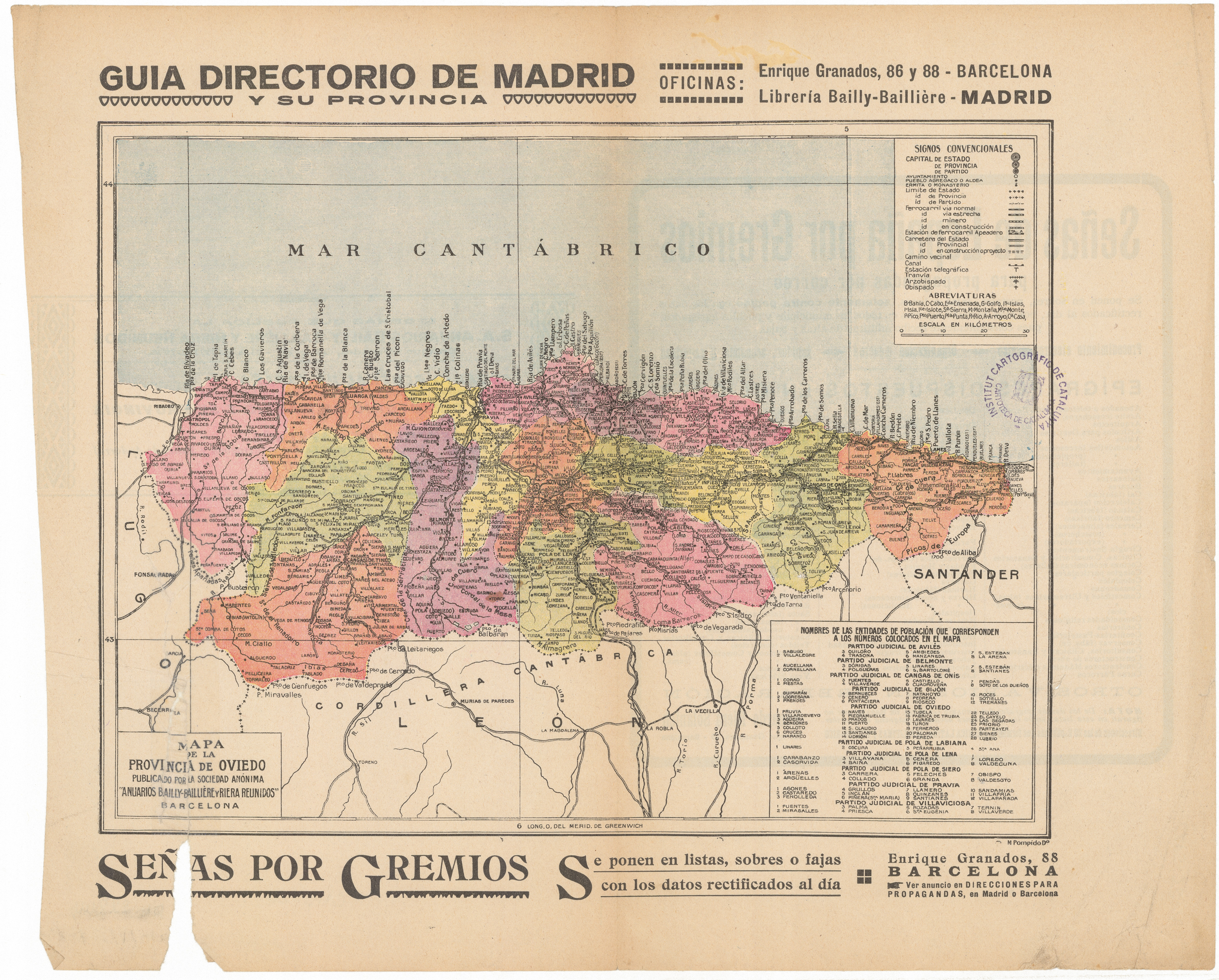 Folleto de propaganda de la editorial Baylly-Baillière. Datado entre 1920 y 1929 aproximadamente.